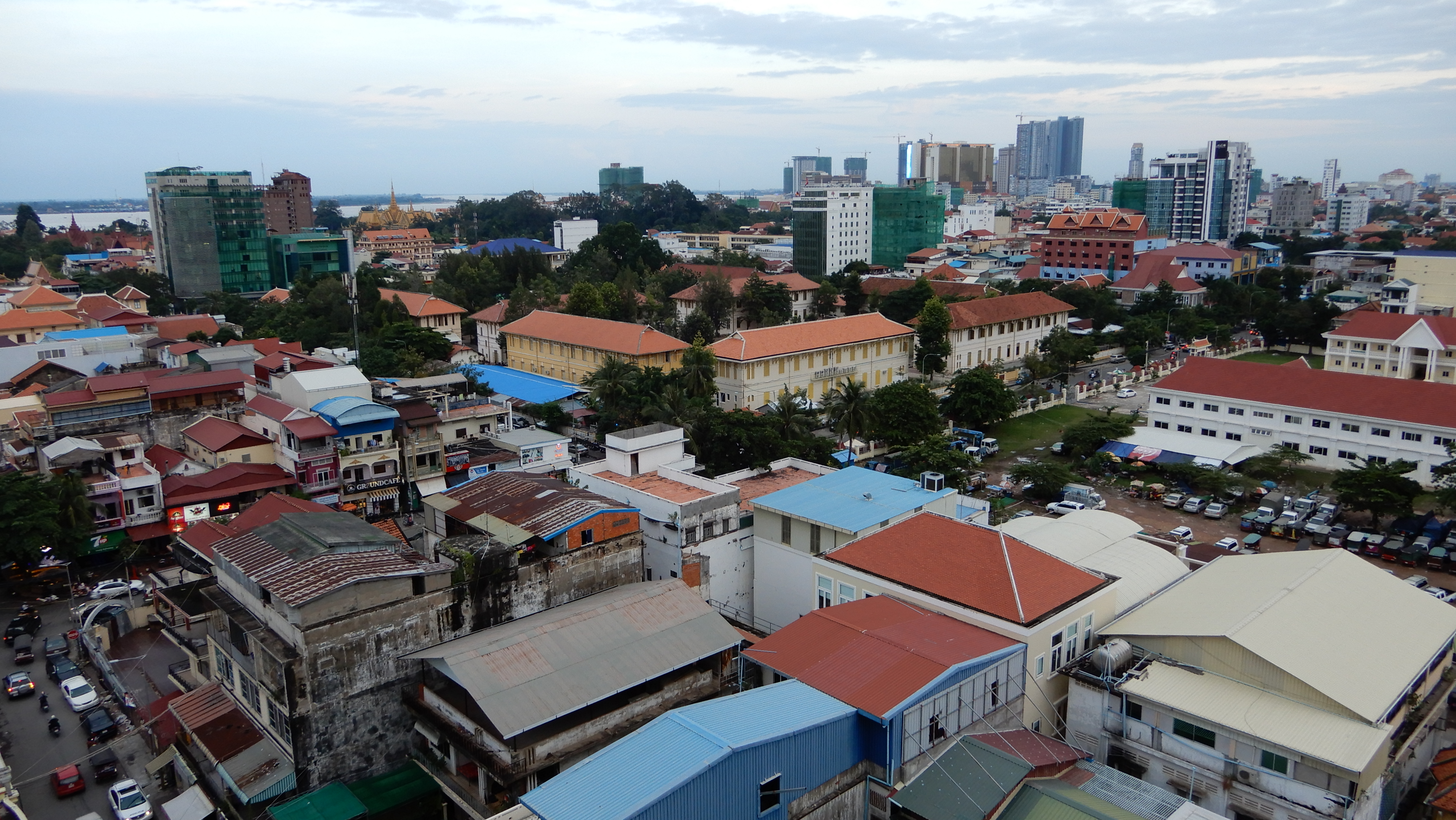 Phnom Penh, Stadtansicht (2017)